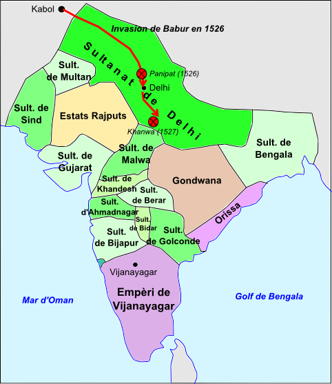 Division de la peninsula indiana vèrs 1520.